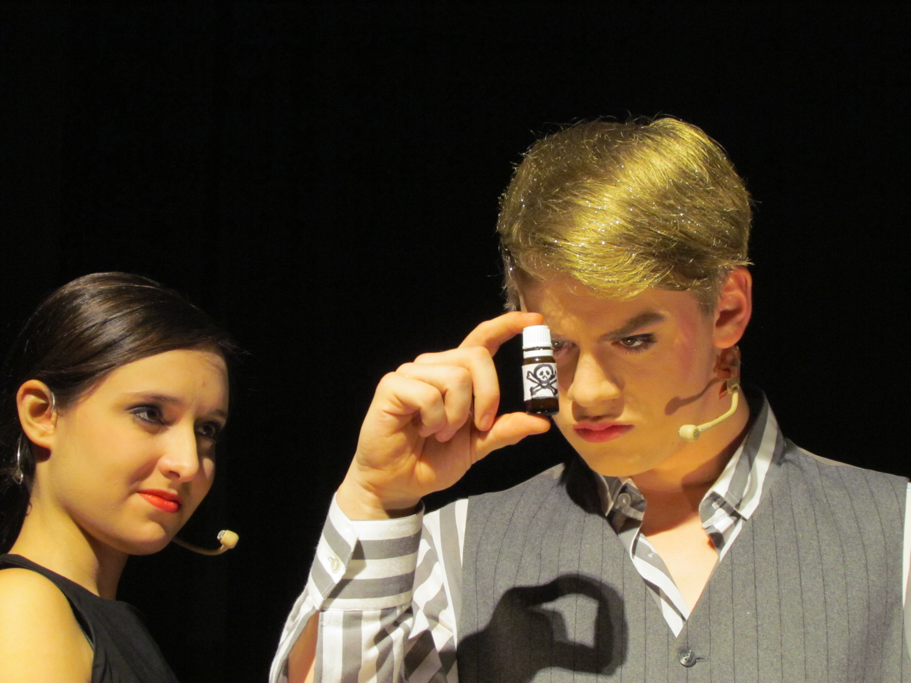 Foto von der Aufführung des Musicals Zum Sterben schön in der Brunsviga in Braunschweig